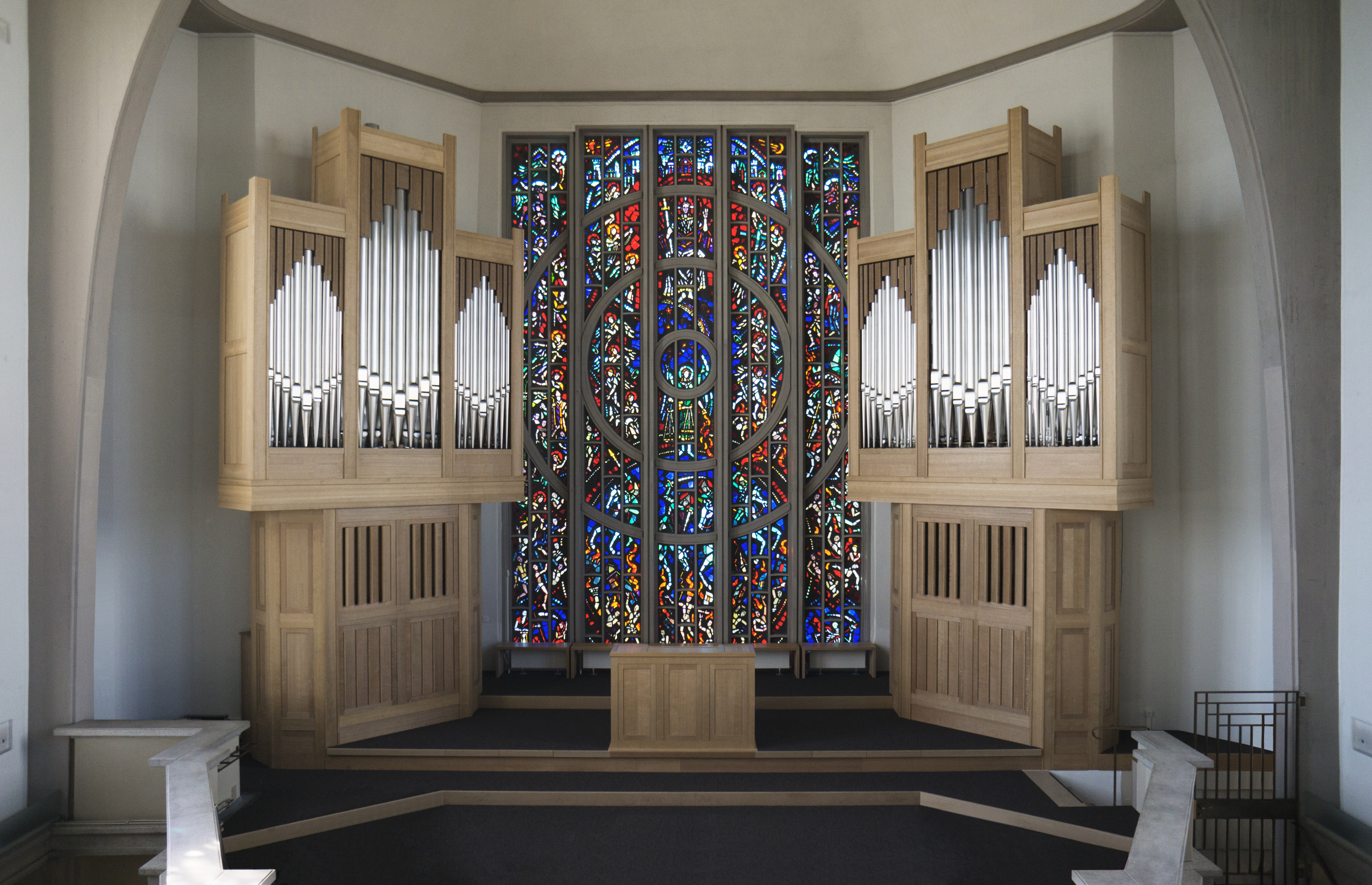 Römisch-katholische Pfarrkirche Maria Frieden Dübendorf, Edskes Orgel März 2014